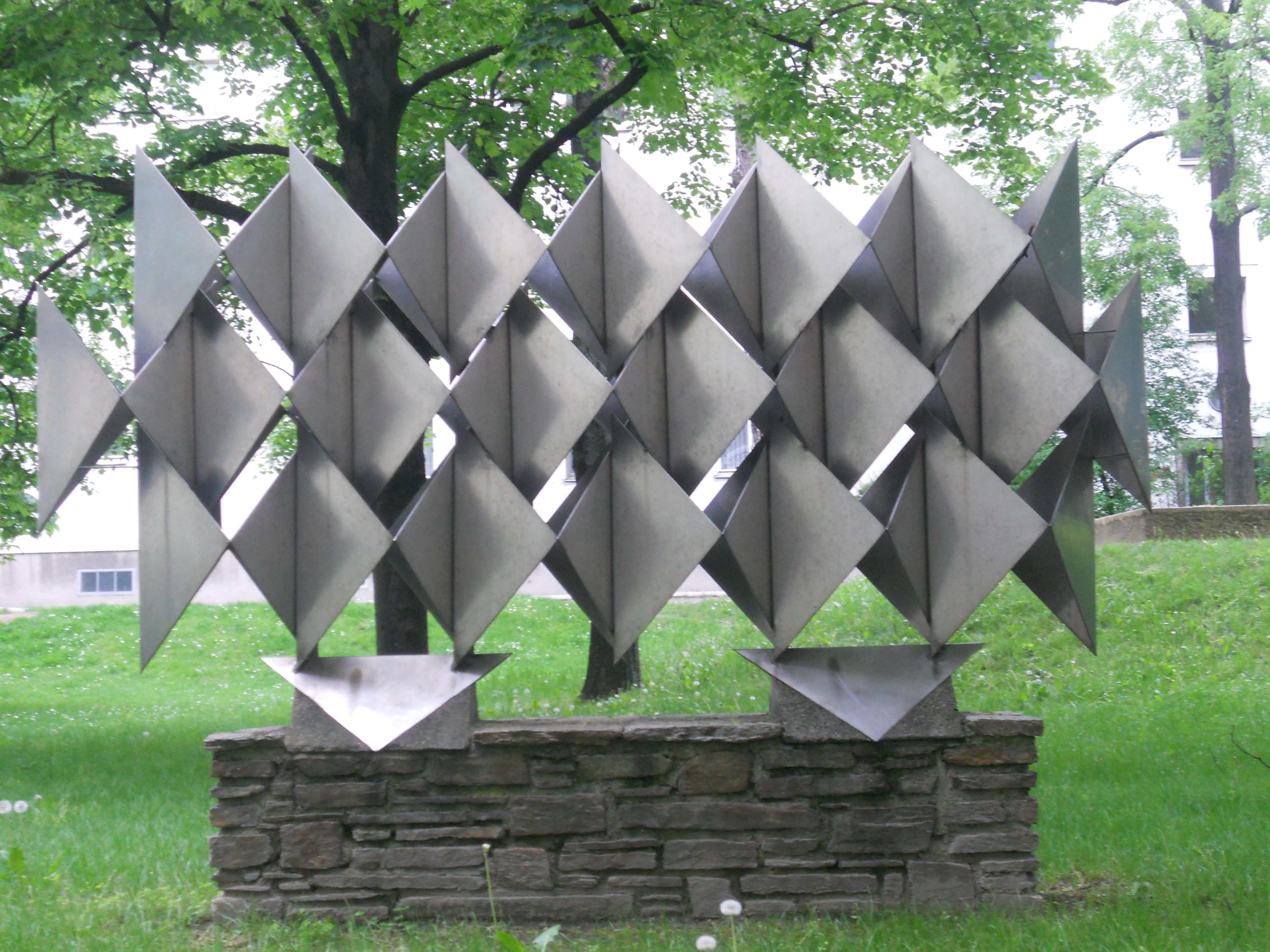 Skulptur "Lichtspiel" im Hof der Wohnhausanlage Wehlistraße 303 in Wien